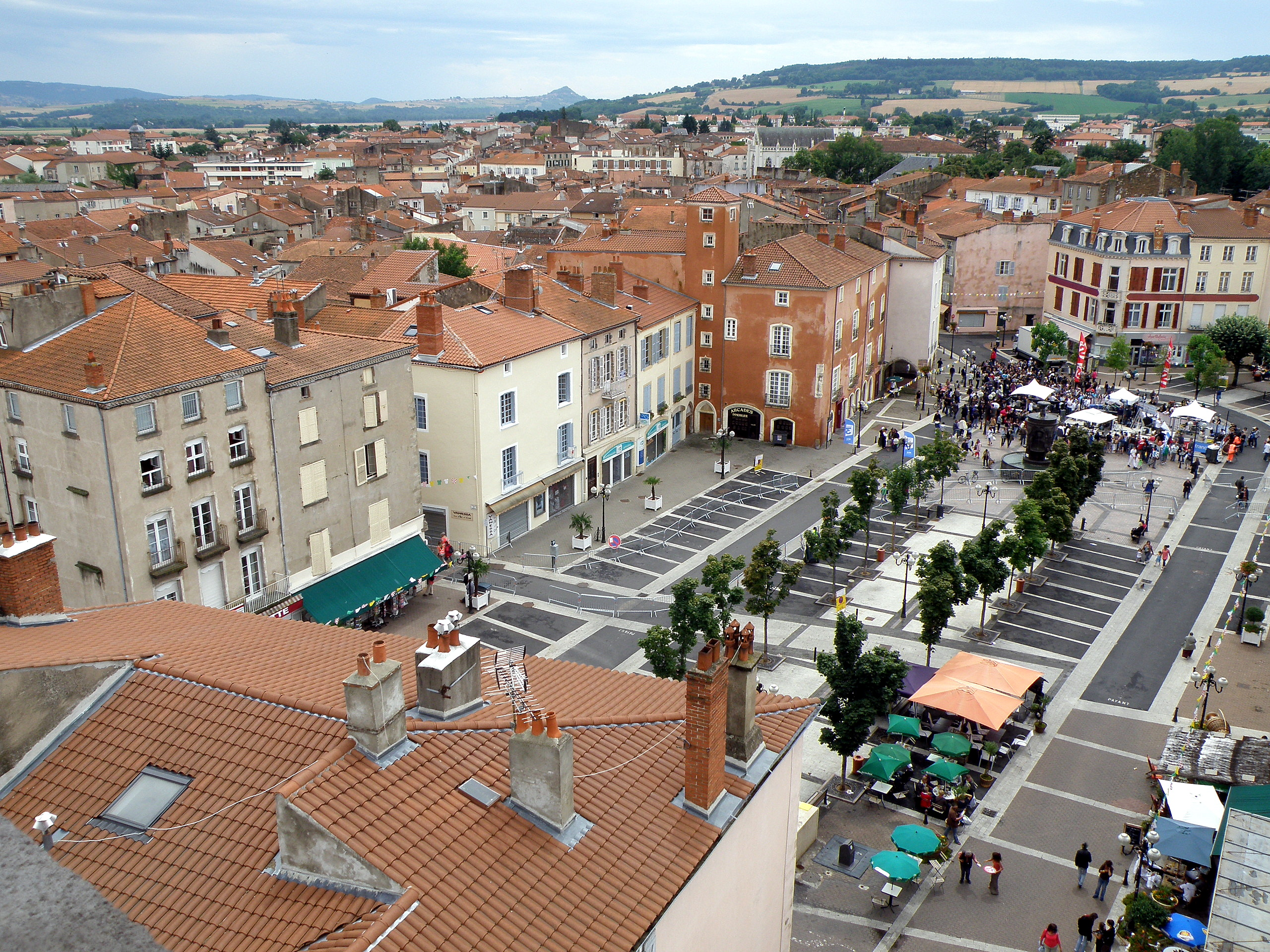 Issoire (Puy-de-Dôme). Place de la République, vue depuis la tour de l’Horloge.